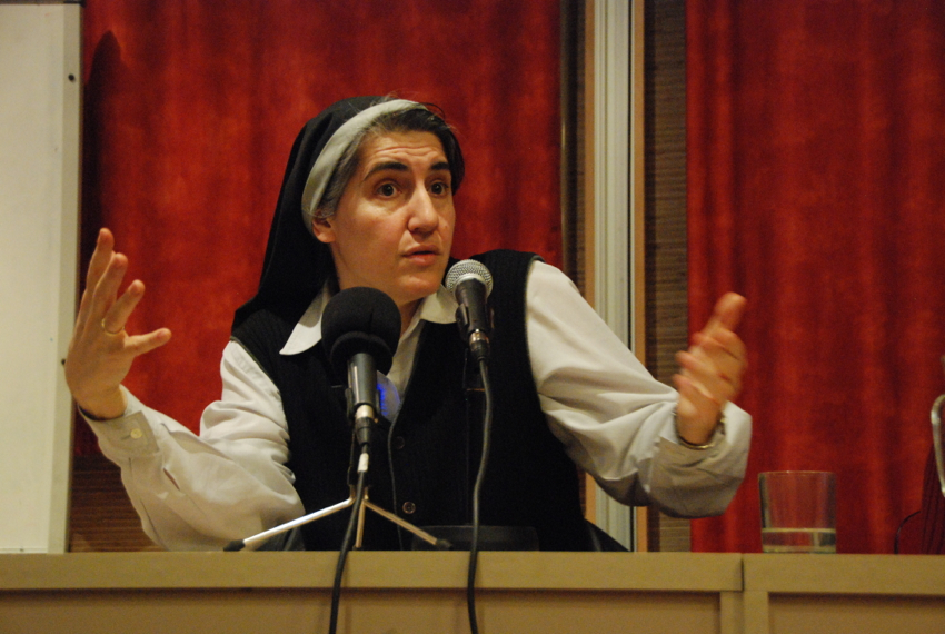 Teresa Forcades presentant "Capitalisme i ètica. Els crims de la indústria de la salut i la resistència popular" a l'Aurea Social, Barcelona. (article - vídeo)